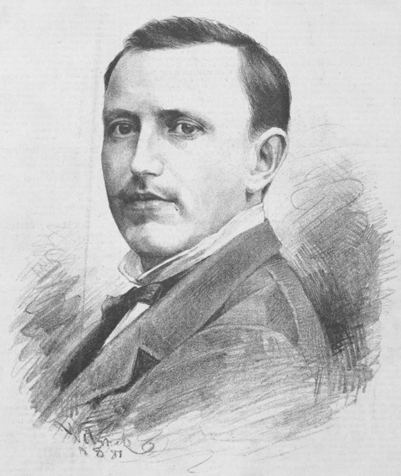 Portréty osobností od Jana Vilímka: Antonín Pavel Wagner (1834-1895), sochař